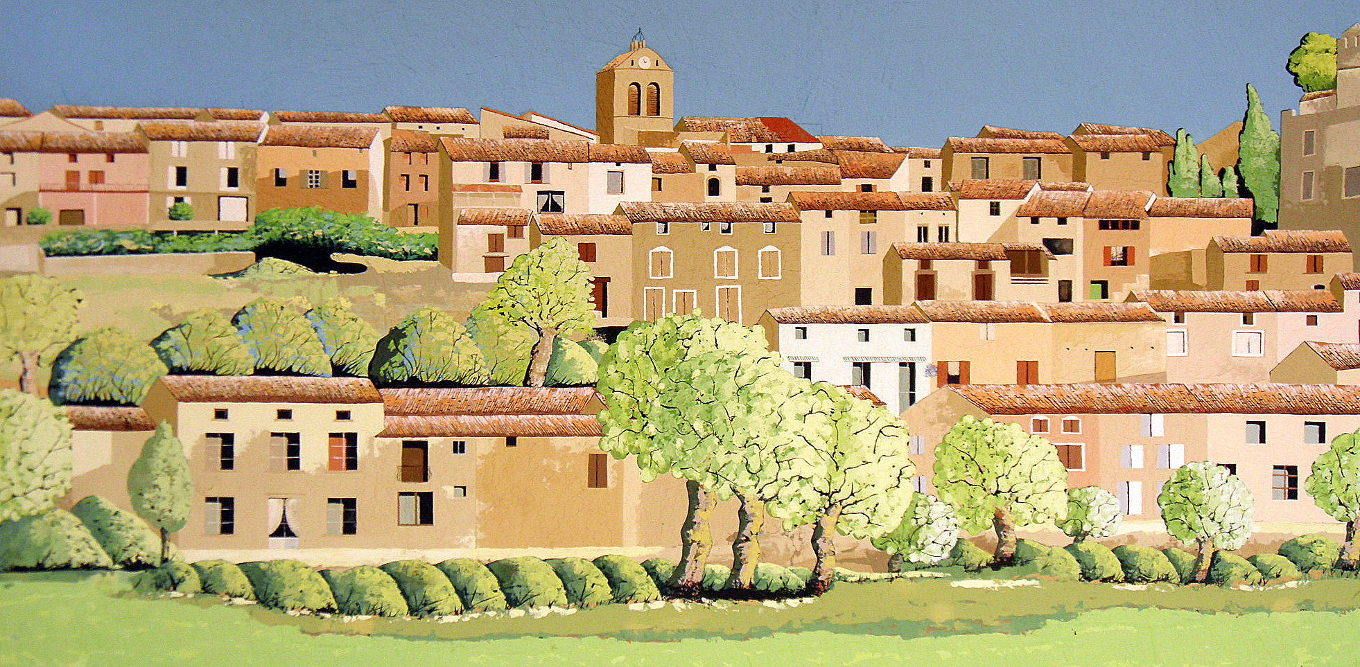 Fresque représentant le village de Raissac sur lampy, peinte sur le mur de l'ancienne salle de classe